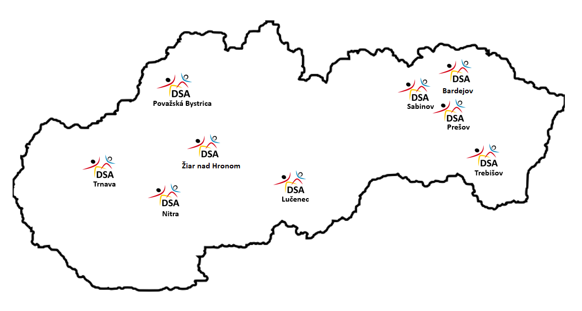 Deutsch-Slowakische Akademien Map 2019